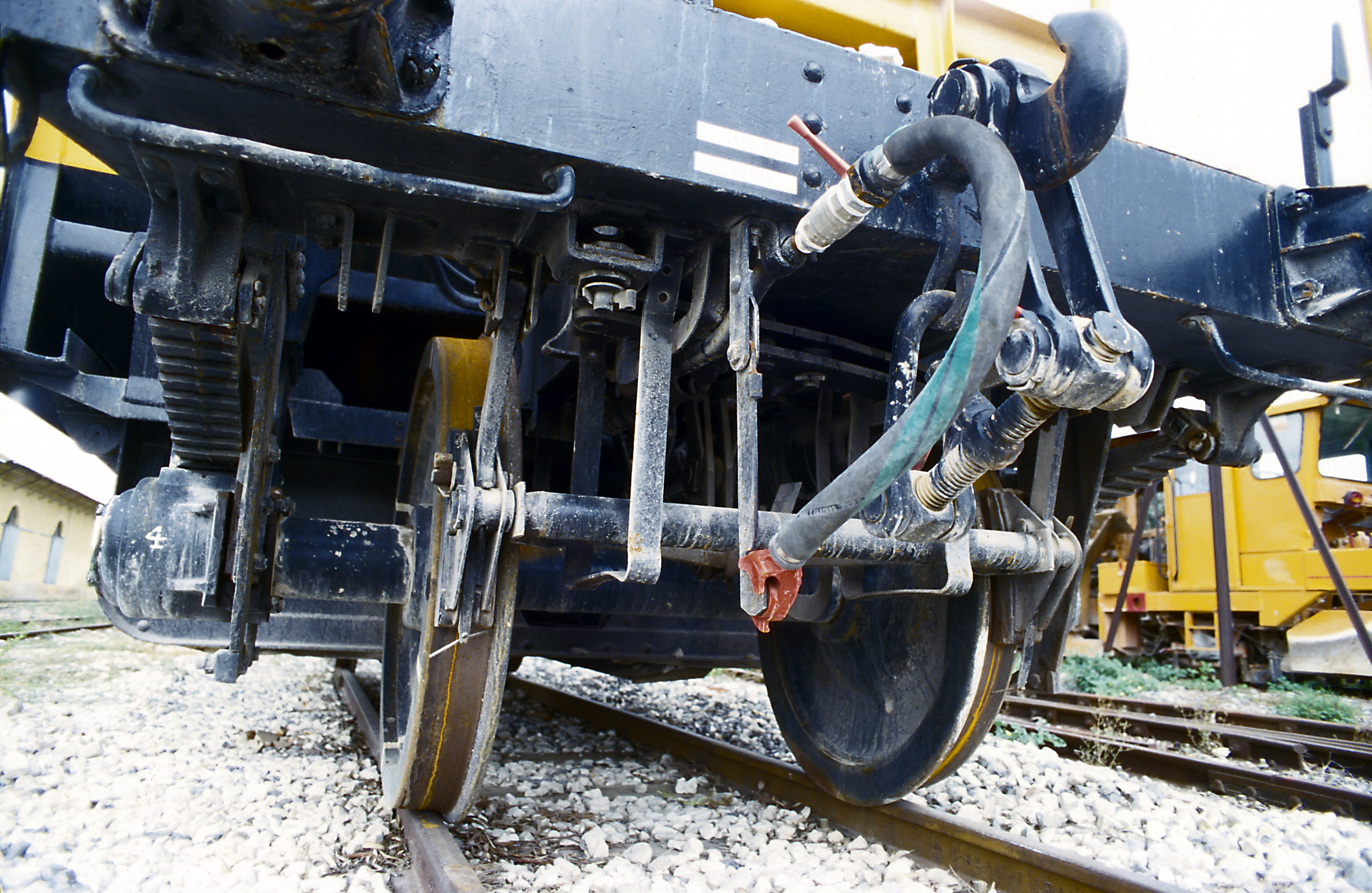 ursprünglich regelspuriger Schotterwagen, erkennbar sind die Aufnahmen für die Bremshängeeisen in Regel- und Meterspur. Die Bremsdreiecke müssen beim Umspuren wegen der großen Spurweitendifferenz gewechselt werden. Bahnhof Árgos